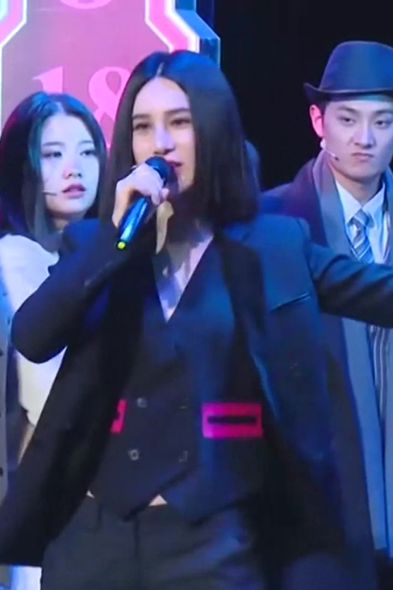 中文（中国大陆）: 尚雯婕在《一年级》节目现场